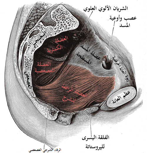 رسمٌ توضيحيٌّ لِلعضلة الرافعة للشرج من الداخل.